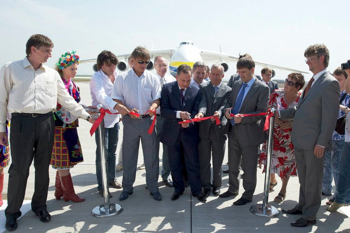 Урочисте перерізання червоної стрічки, м. Донецьк